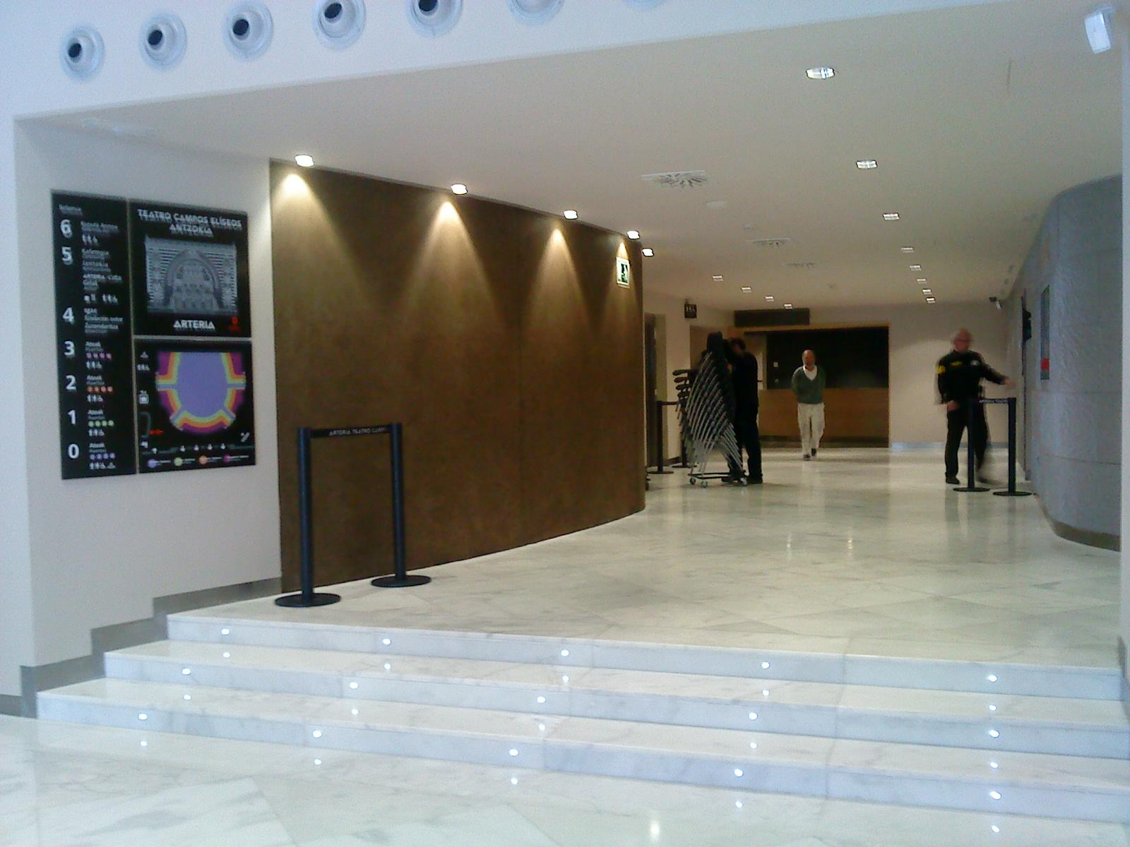 Hall principal del teatro Arteria Campos Elíseos Antzokia de Bilbao, Vizcaya (País Vasco, España)